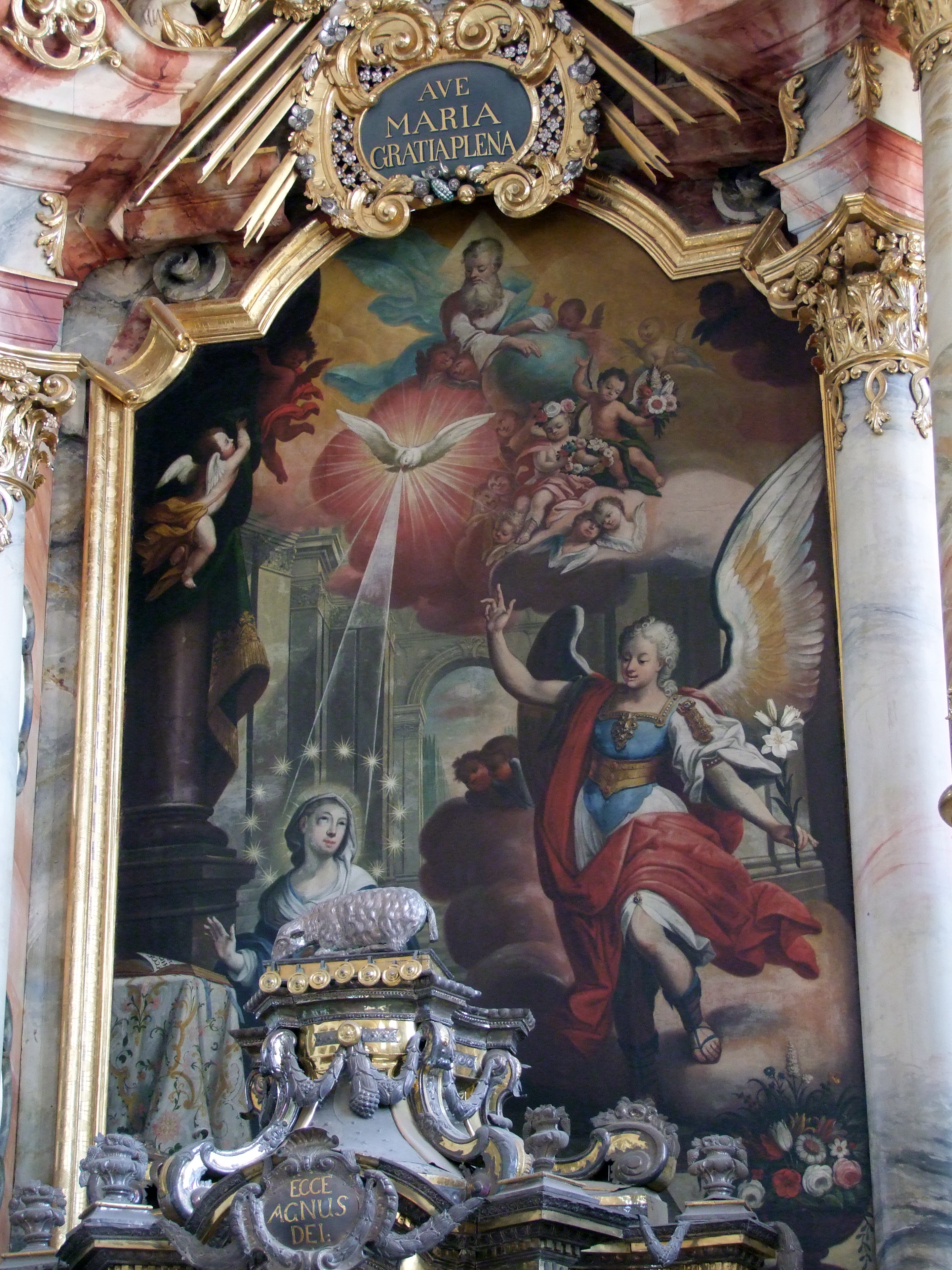 Mariä Verkündigung im oberschwäbischen Mindelheim. Ehemalige Augustiner, dann Jesuitenklosterkirche.